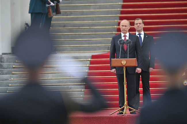 Revisión del Regimiento Presidencial.